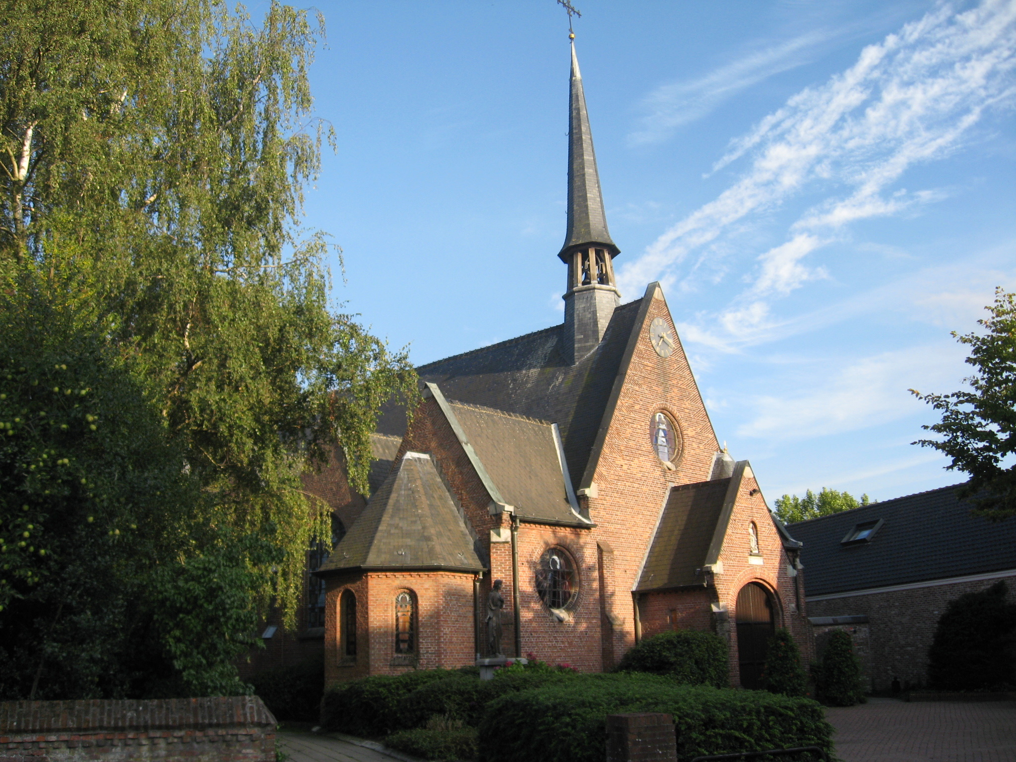 Parochiekerk Sint-Jan Baptist in De Straat, Weelde